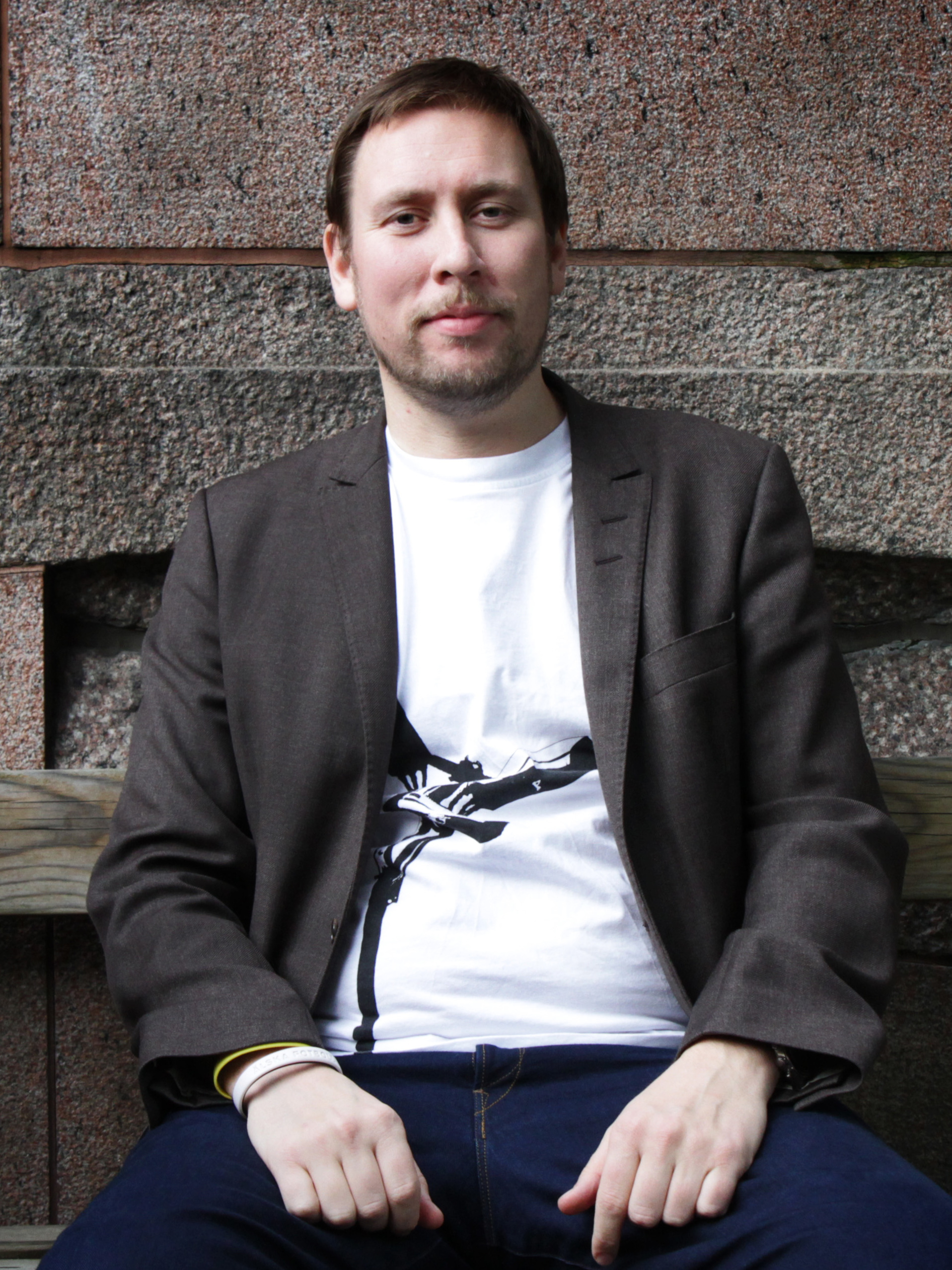 Ordförande för Finska delegationen Paavo Arhinmäki vid Nordiska Rådets session i Stockholm